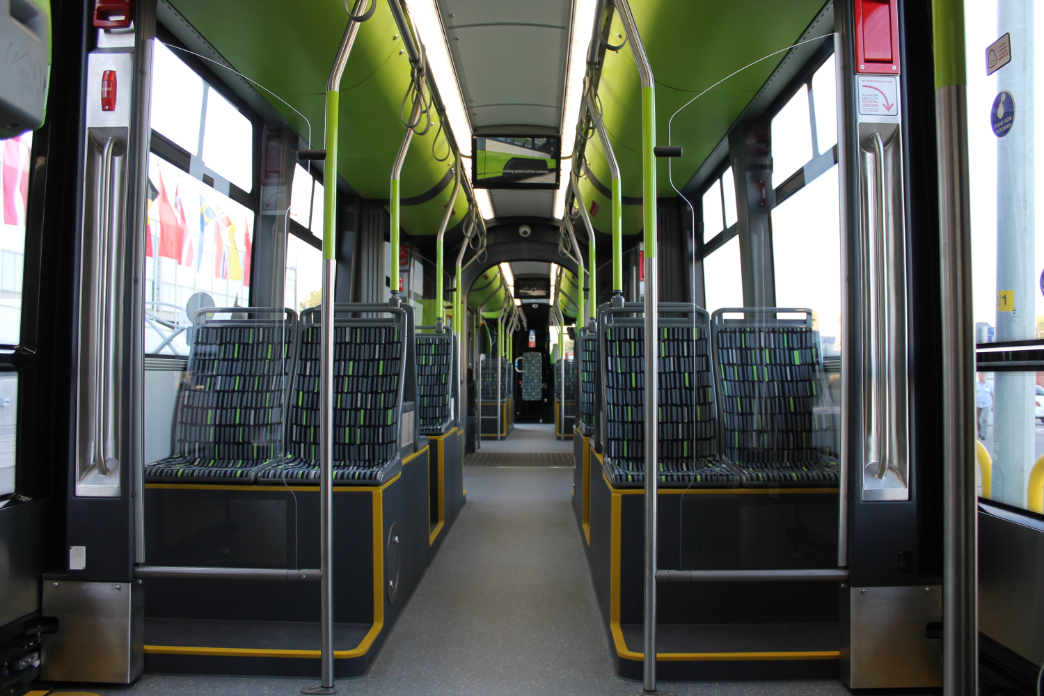 Wnętrze tramwaju Solaris Tramino S111o-3011 podczas targów Trako 2015. The making of this document was supported by Wikimedia Polska Association, within Wikigrant no. WG 2015-34. English | polski | +/−